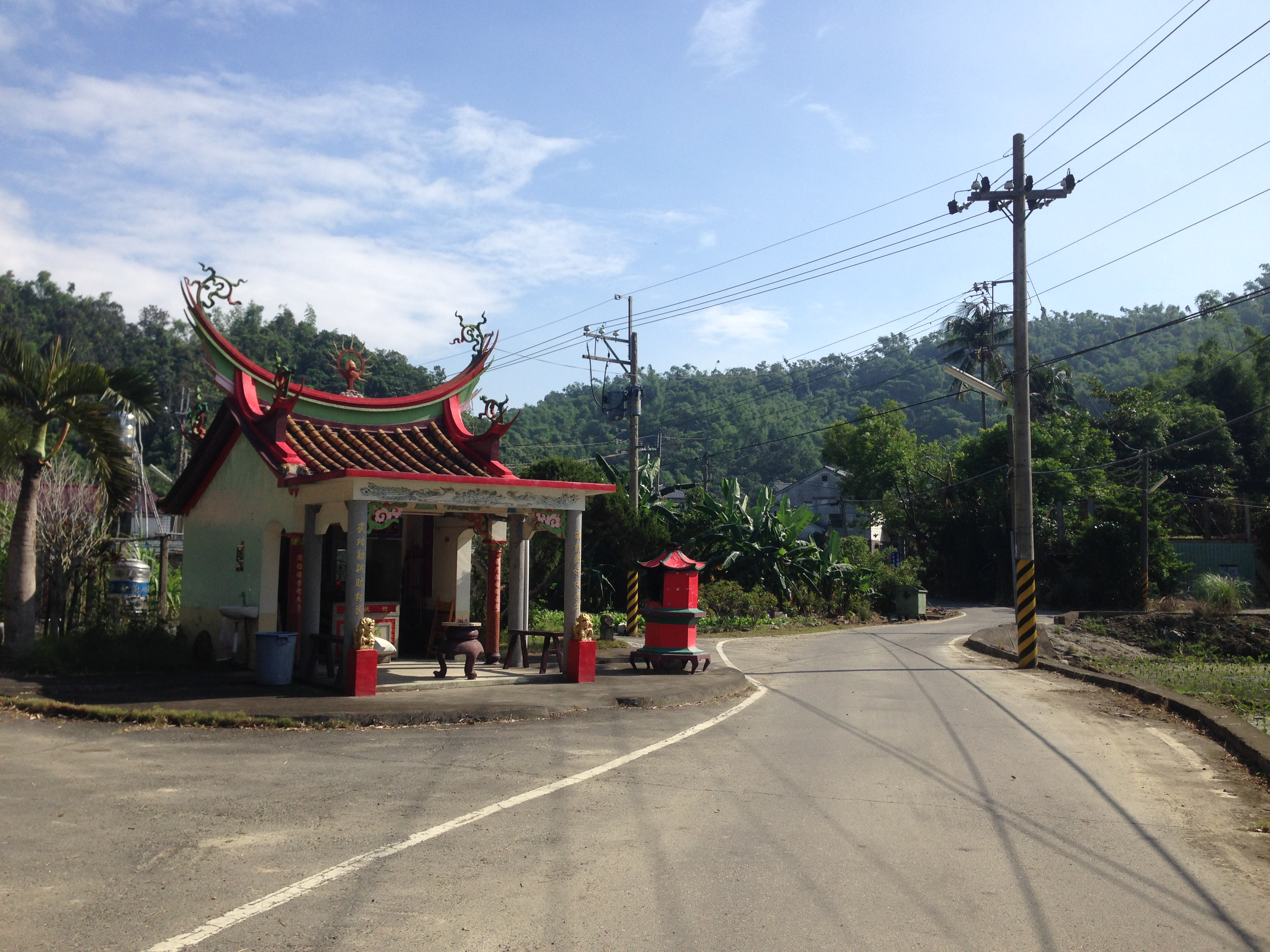 竹扶人威武將軍祠